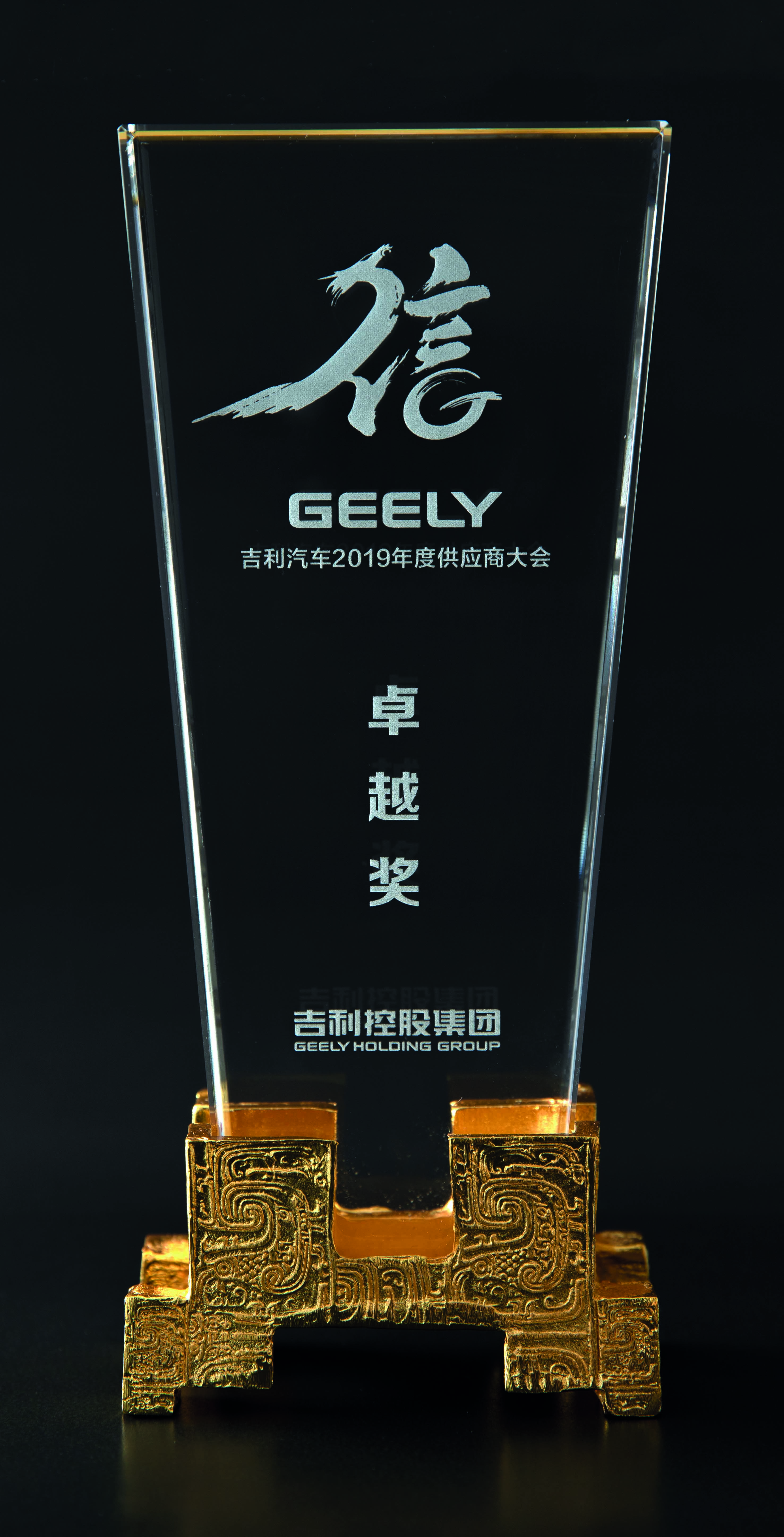 Am 25. März 2019 wurde JUNKER zum zweiten Mal in Folge als einziger europäischer Lieferant von Zhejiang Geely Automobile Parts & Components mit dem „Geely Excellence Auto 2019“ Award ausgezeichnet.